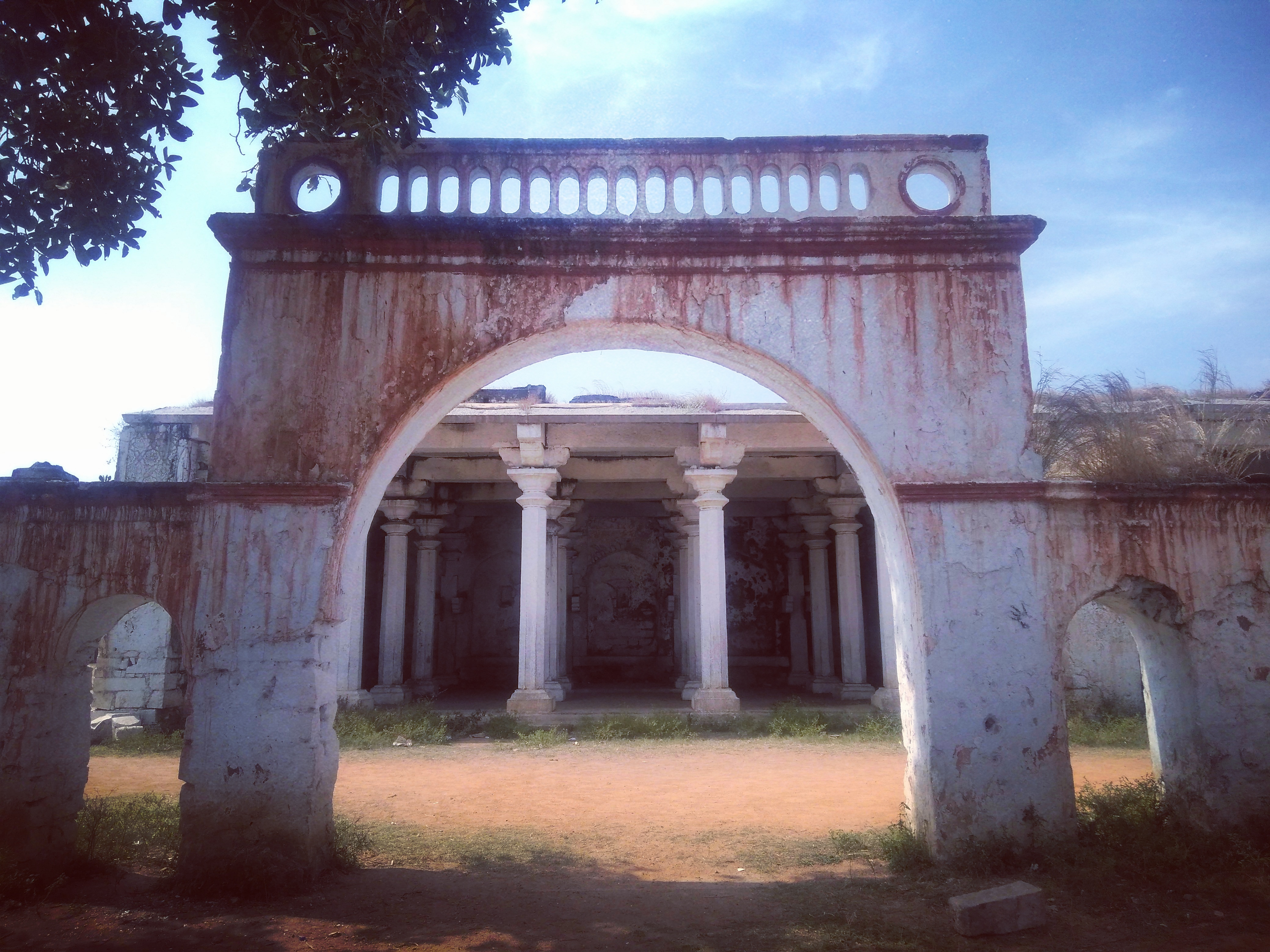 అక్కన్న మాదన్న గడికోట -మహేశ్వరం: మహేశ్వరం లో గల కోదండ రామస్వామి దేవాలయం వెనుక అక్కన్న మాదన్నల కచేరి కేంద్రం ఉంటుంది .నాలుగొందల సంవత్సరాల క్రితం క్రీ.శ 1658 నుంచి 1687 వరకు గోల్కొండను పాలించిన అబూహసన్ తానీషా కాలంలో ఇదే ఊరిలో ఆయన మంత్రులు అక్కన్న మాదన్నలు తిరుగాడేవాళ్లు. విడిది కోసం తరుచూ మహేశ్వరానికి వచ్చేవారు. భద్రాచలం నిర్మాణానికి ముఖ్యపాత్ర వహించిన అక్కన్న, మాదన్నలు, కంచర్ల గోపన్నలతో మహేశ్వరం ప్రత్యేక అనుబంధాన్ని కలిగి ఉన్నది. అక్కన్న మాదన్నల తండ్రి భానూజీ పంతులు మహేశ్వరం పక్కన ఉన్న హన్మకొండలో శిస్తులు వసూలు చేసే అధికారి. ఆయన అక్కన్నపల్లి, మాదన్నపల్లి, భానుపురం అనే మూడు గ్రామాలను నిర్మించాడు. ఈ రోజు అవి అకాన్‌పల్లి, మన్‌సాన్‌పల్లి, సుభాన్‌పల్లిగా వాడుకలో ఉన్నాయి. అక్కన్న మాదన్నలు ఈ ప్రాంతంలో 108 దేవాలయాలు కట్టించారు. అందులో ఒకటి మాంఖాల్ మహేశ్వరంలోని రాజరాజేశ్వరాలయం. గడీలో ఉండేవి: ఈ గడిలో రాముడు లేని గుడి.ఒక మూలన అమ్మవారి చిన్న గుడి మరియు ఆ పక్కనే గడిలో అలనాటి మసీదు.. ఇంకోపక్క గడిలో ఒక పాఠశాల ఉంటుంది. గడీ విశిష్టత: అక్కన్న మాదన్న ఘడికోటలో మైసమ్మ బోనాలు అత్యంత వైభవంగా జరుగుతాయి. భక్తులు వేల సంఖ్యలో అమ్మవారికి బోనాలు సమర్పించుకుని మొక్కులు తీర్చుకుంటారు.భక్తులు సాయంత్రం సామూహిక ఊరేగింపుగా వచ్చి అమ్మవారికి బోనాల నైవేద్యం సమర్పిస్తారు.. ఊరేగింపులో గంగపుత్రుల జాలమందిళ్ళుల పోతురాజుల విన్యాసాలు, శివసత్తుల పూన కాలు, బ్యాండు మేళాలు, డప్పుల దరువులు,ప్రత్యేక ఆకర్షణగా నిలుస్తాయి.ప్రతీ యేటా శివరాత్రి ఉత్సవాలు కూడా ఘనంగా జరుగుతాయి. ప్రయాణ మార్గం: హైదరాబాదుకి సుమారు 27 కిలోమీటర్ల దూరంలో ఉన్న ఈ మహేశ్వరం గడీకిి బస్సు మార్గం మరియు ప్రైవేటు వాహనాల ద్వారా చేరుకోవచ్చు.హైదరాబాద్ లోని చార్మినార్, కోఠి,ఇబ్రహీంపట్నం,చాంద్రాయణగుట్ట ,రాజేంద్రనగర్ నుండి మహేశ్వరానికి ఆర్టీసీ సదుపాయం ఉంది. Ancient Gadikota Fort Maheshwaram, Telangana 501359